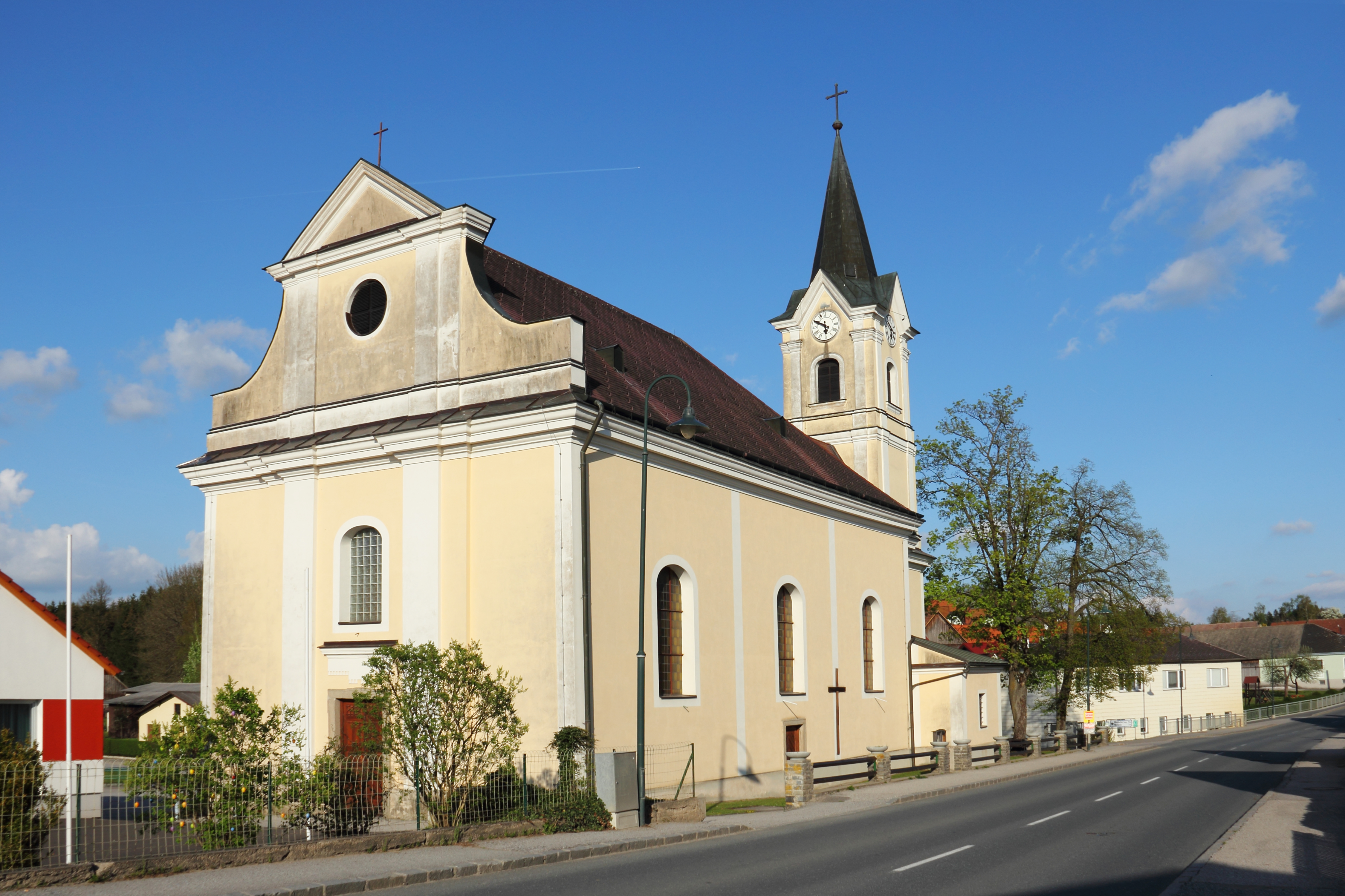 Die Pfarrkirche von Scheideldorf ist dem heiligen Florian geweiht. Die 1784/85 nach der Pfarrgründung erbaute, josephinische Saalkirche befindet sich im Westen des Ortes. Im Hintergrund: Das Naturdenkmal ZT-158 - 1 Bergahorn und 1 Sommerlinde This media shows the natural monument in Lower Austria with the ID ZT-158.